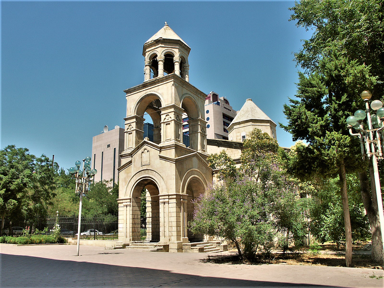 Армянская церковь в Баку. Охраняется государством.